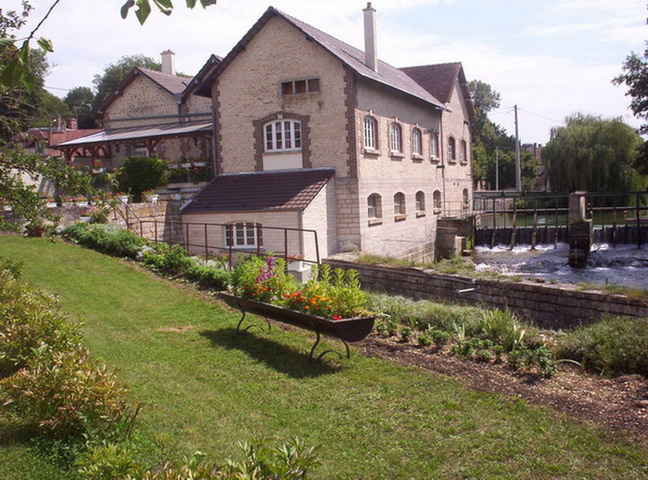 La micro-centrale hydroélectrique de Chappes (10 AUBE)